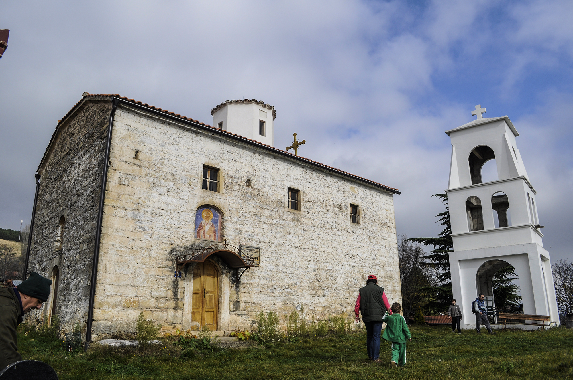 Црквата Свети Никола во Горно Соње